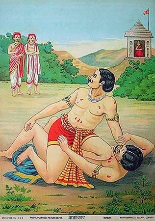 Abhimanyu Laxman Vadh